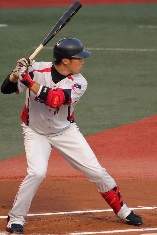 楠城祐介 2012年8月1日 クリネックススタジアム宮城